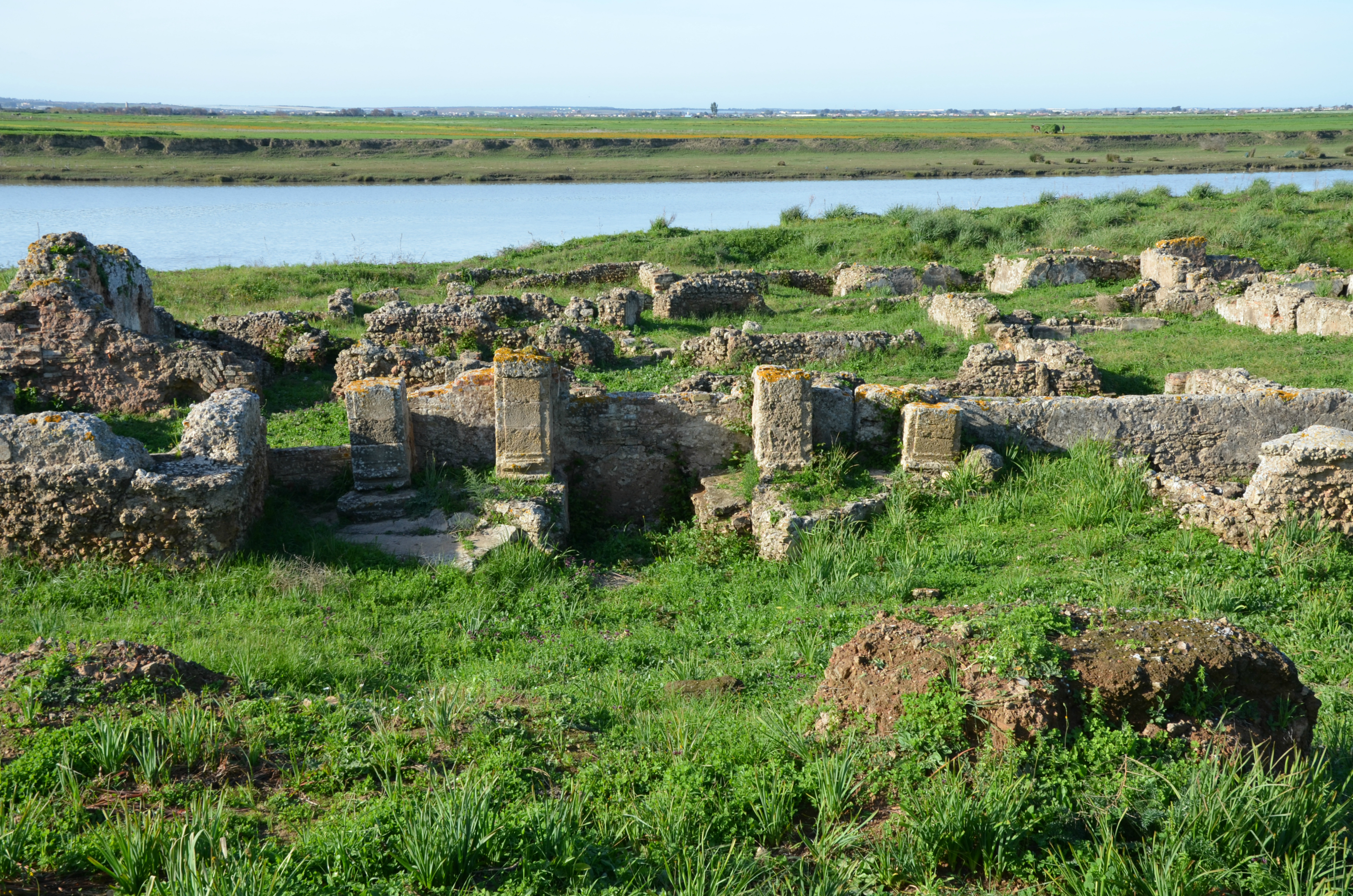 Thamusida, Mauretania Tingitana, Morocco